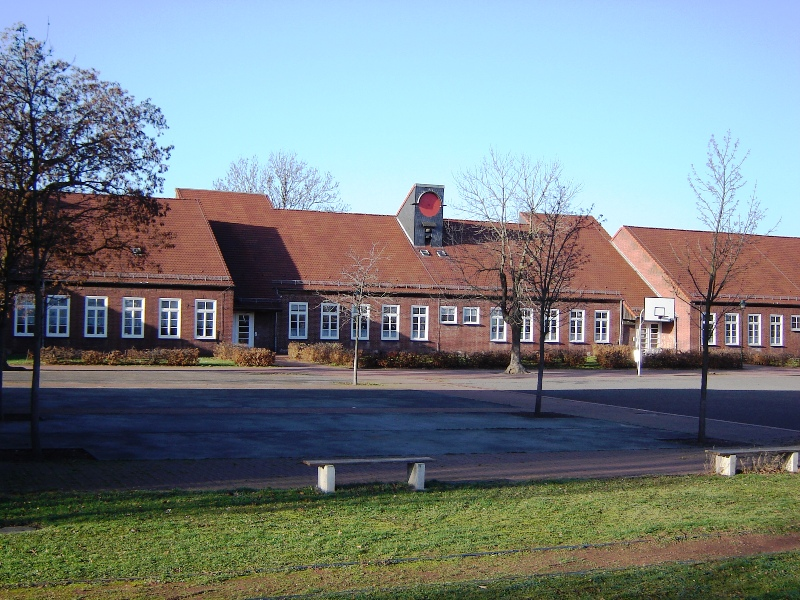 Magdeburg-Rothensee, Goederitz-Schule